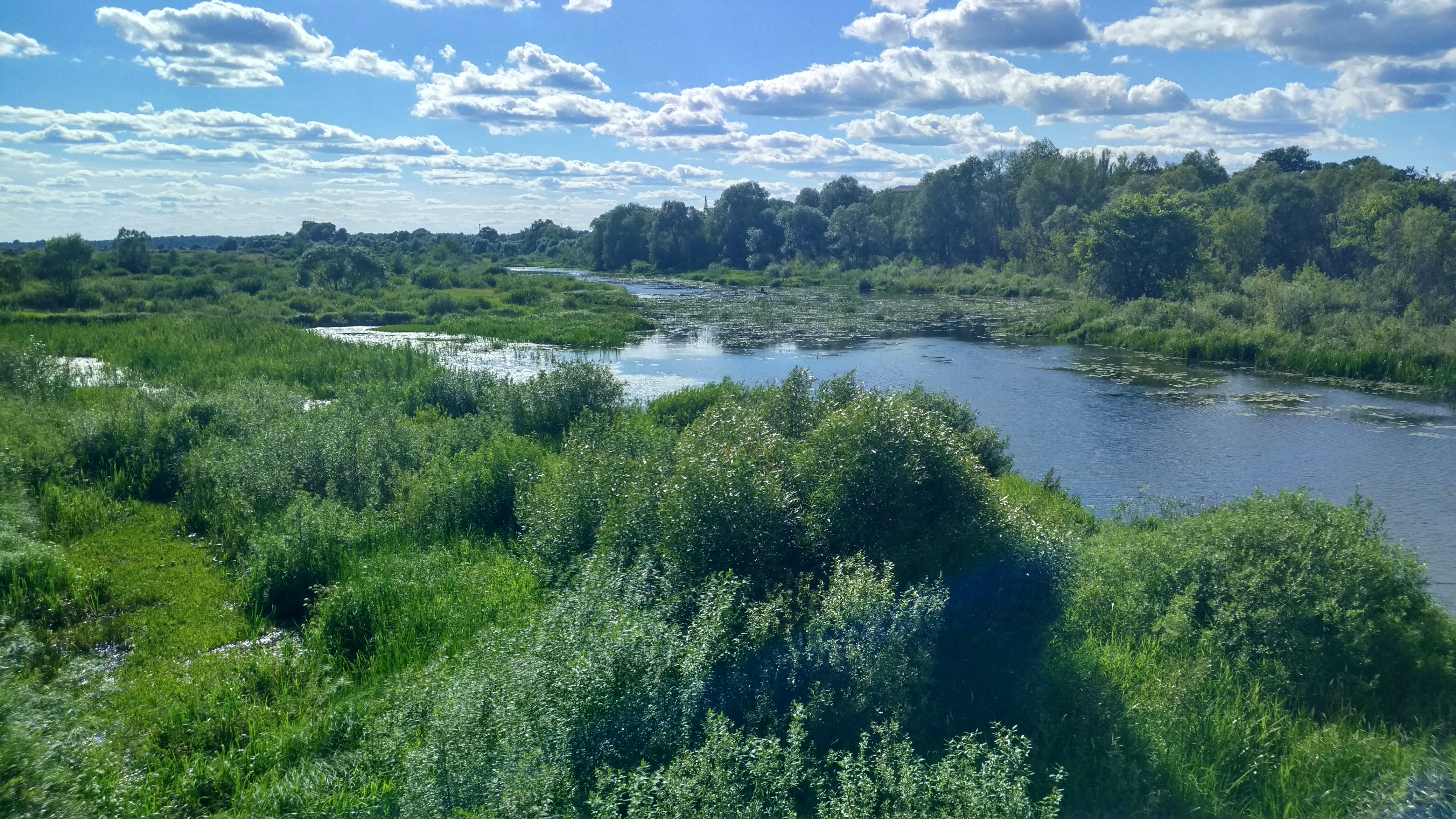 Народичі. Річка Уж при в'їзді до селища (з лівої сторони моста)